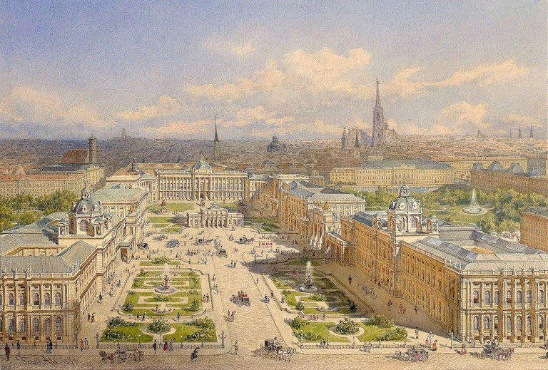 Der alte und der neue Burgplatz in Wien mit dem Projekt des Kaiserforums.